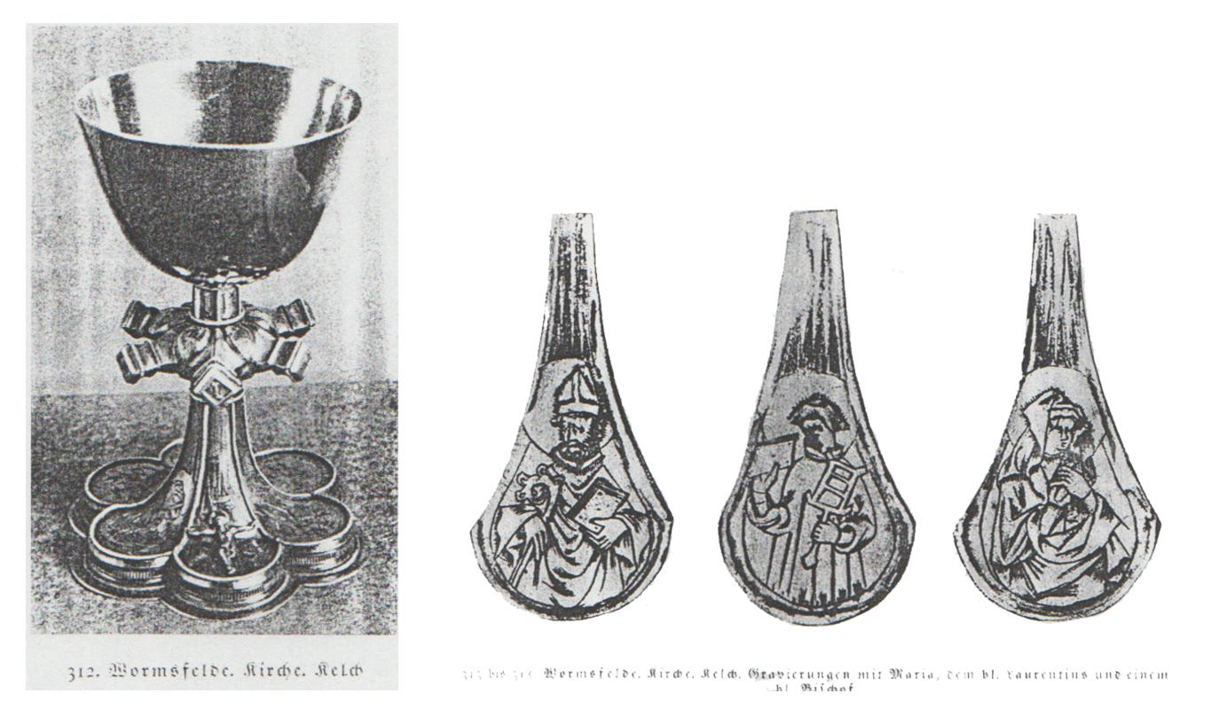 Kościół w Wojcieszycach. Zaginiony kielich.